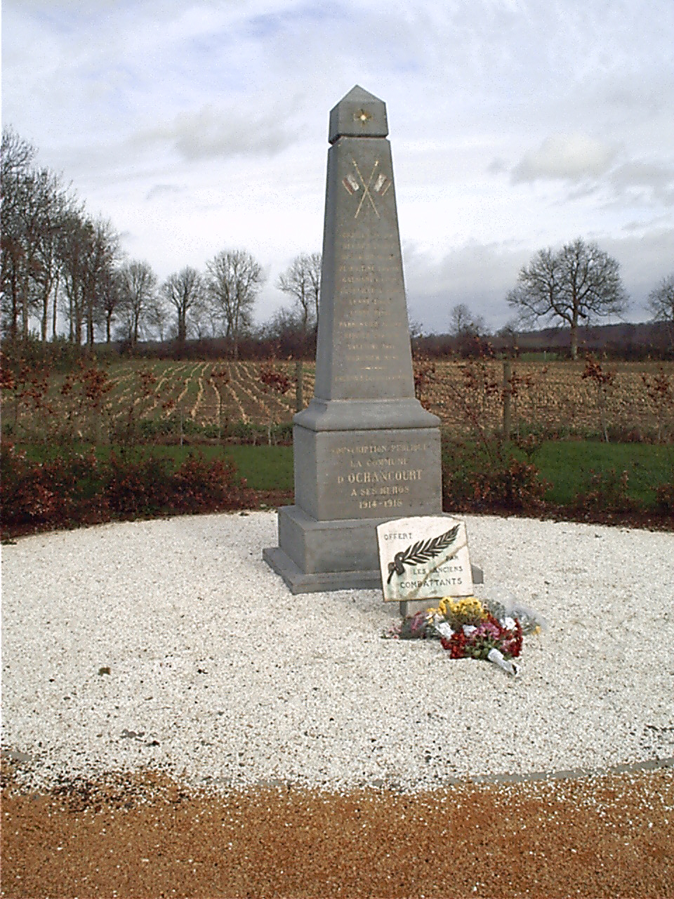 Monument aux morts - Grande guerre - Ochancourt